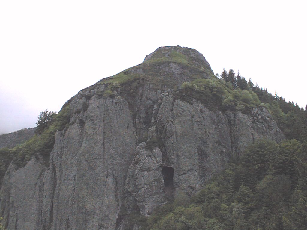 Roche Sanadoire en Auvergne.